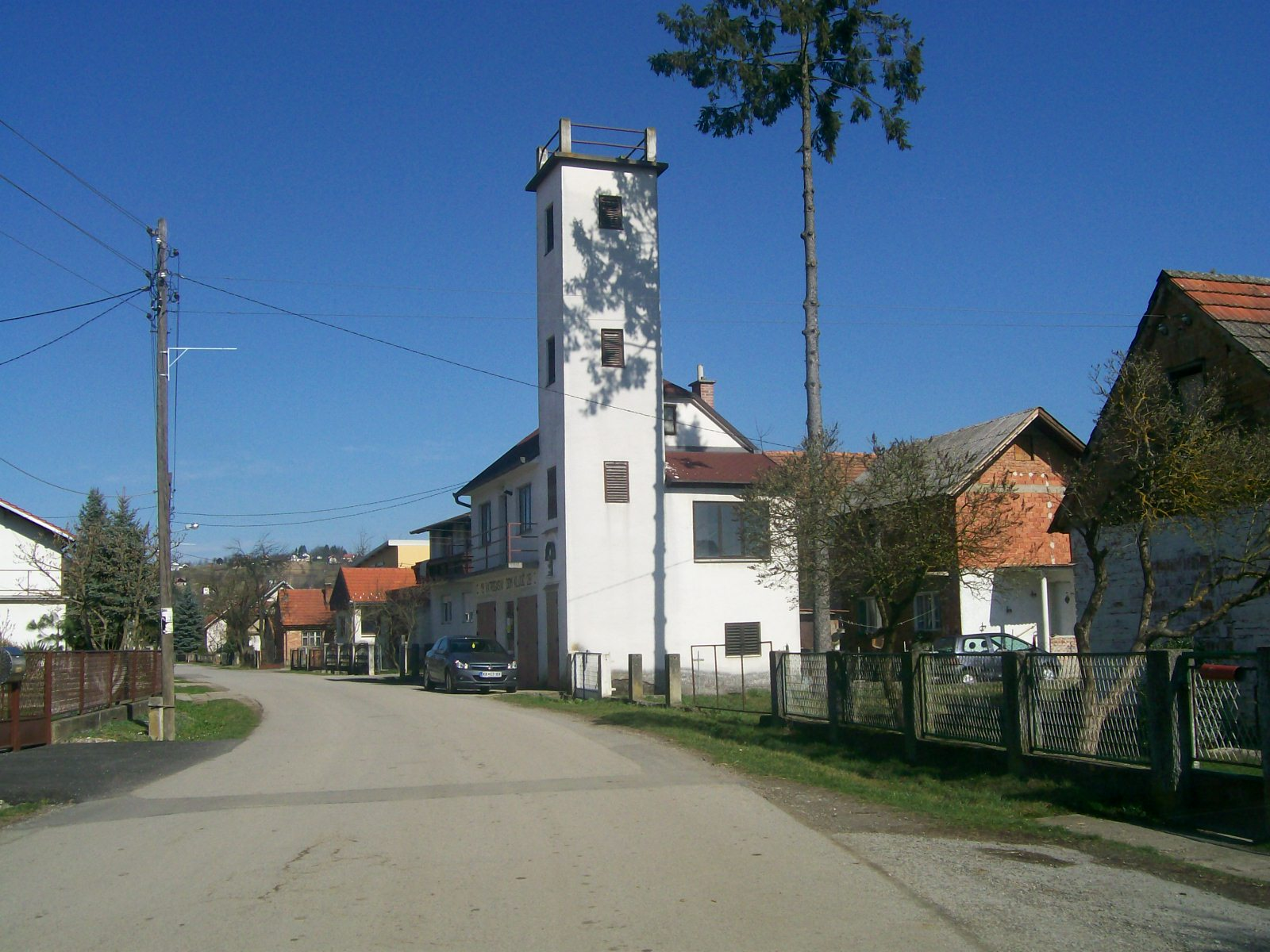 Vatrogasni dom u Ključu Brdovečkom